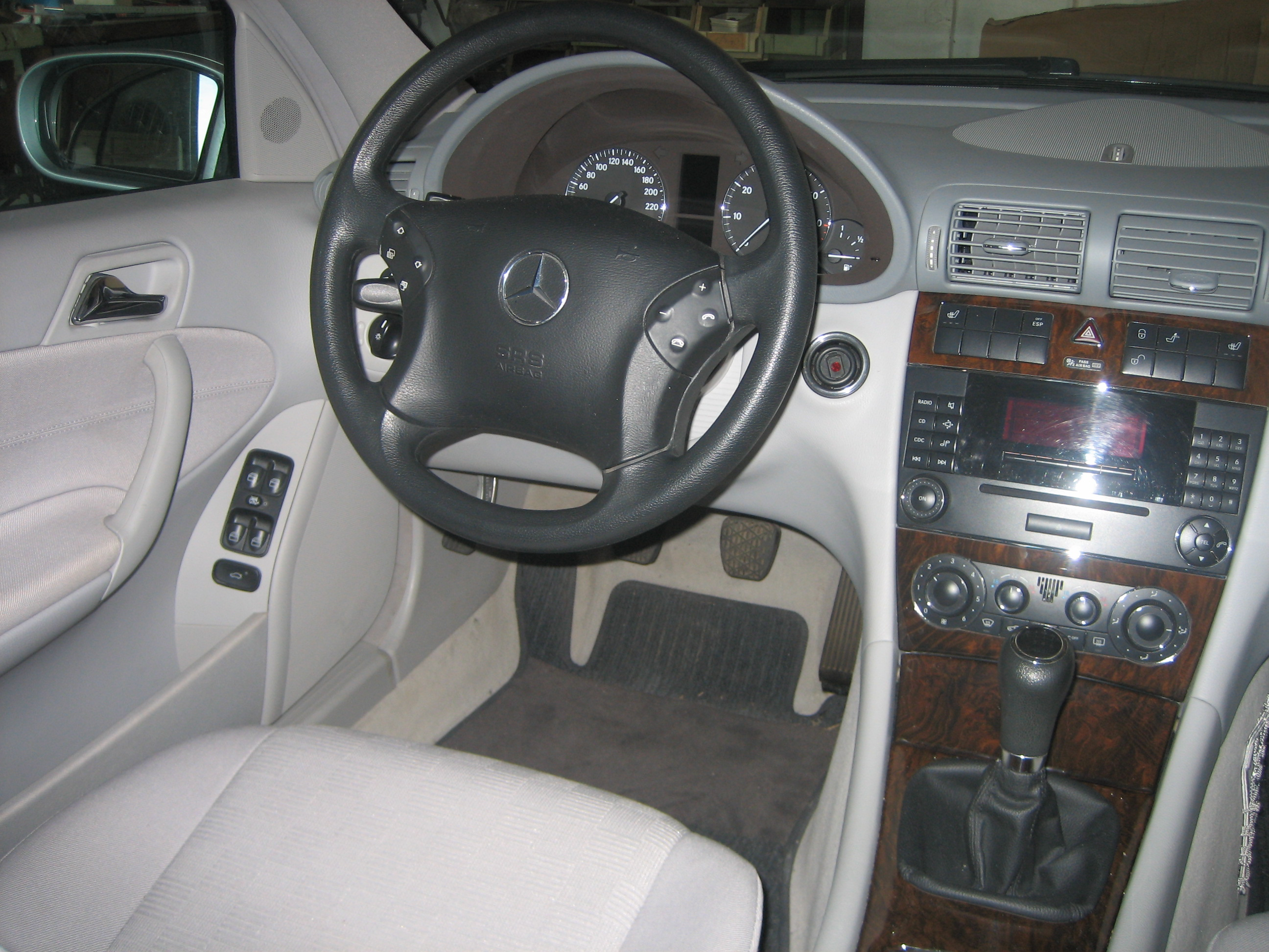 Interieur eines Nach-Mopf Mercedes W203